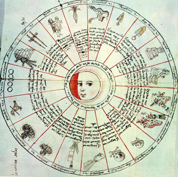 Rueda calendárica elaborada por Fray Francisco de las Navas en 1551 y anexada a la "Descripción de la ciudad y provincia de Tlaxcala" de Diego Muñoz Camargo en 1584. Esta rueda muestra una secuencia de las 18 veintenas (cempohuallapohualli) del calendario solar, con breve descripción de las fiestas. Es la única representación que incluye los cinco días aciagos (nemontemi).